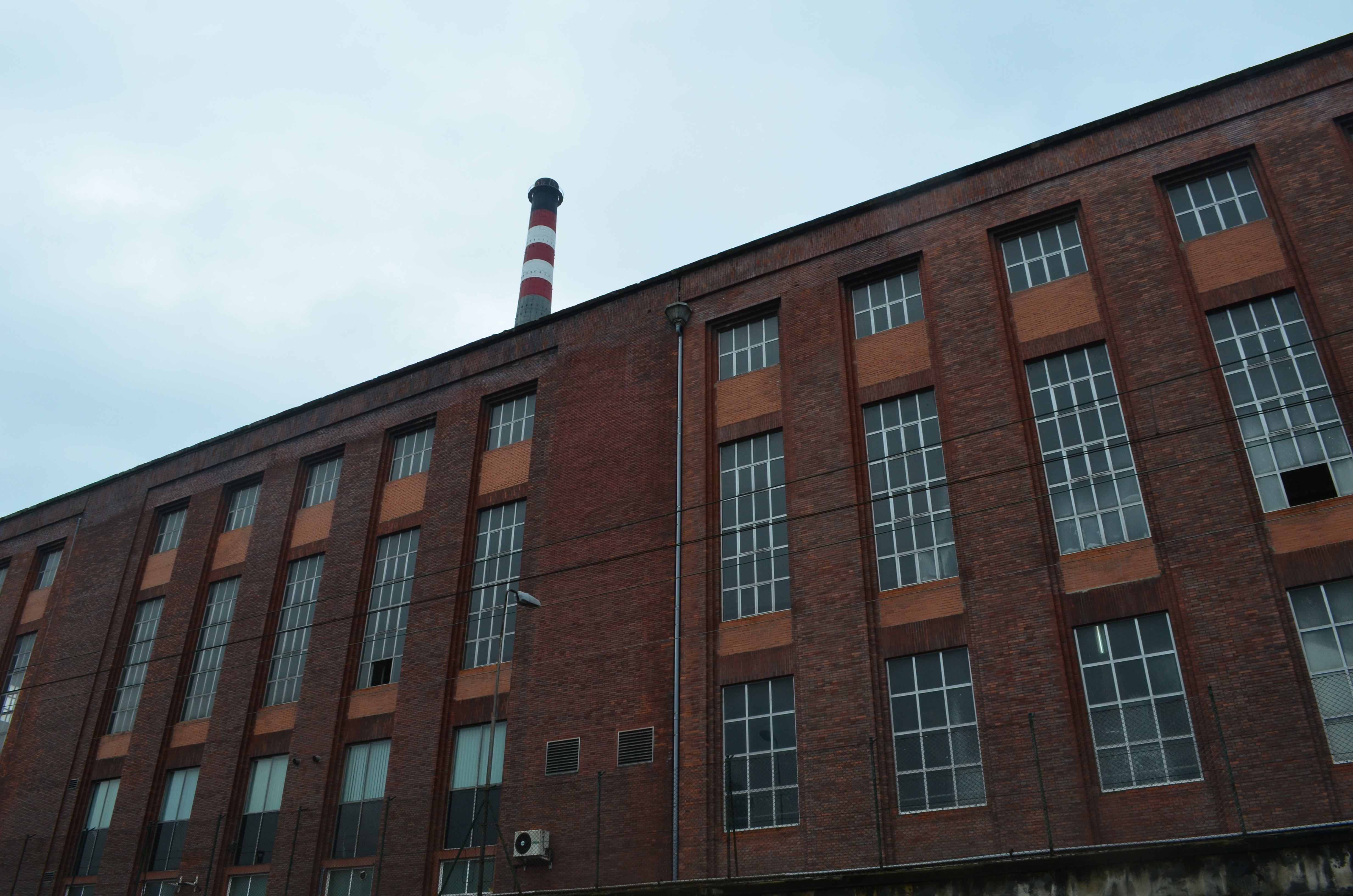 Antigua Compañía Eléctrica de Langreo, hoy Iberdrola, en La Felguera Asturias